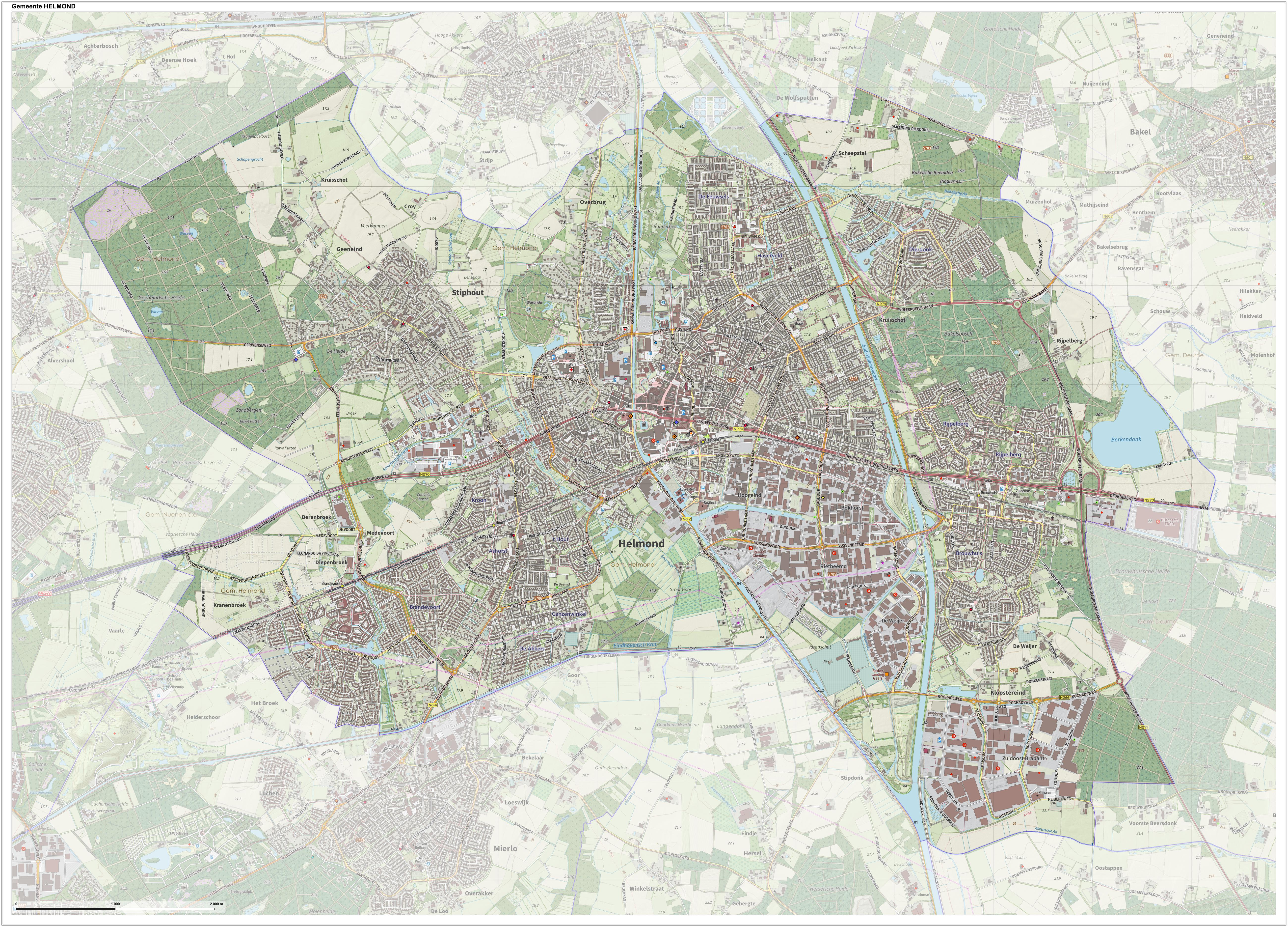 Topografische gemeentekaart. Resolutie: 400 pixels/km. Kaartbeeld samengesteld uit de open geodata van de Top10NL en Top25namen Basisregistratie Topografie, Creative Commons BY licentie. Gebouwvlakken uit open geodata BAG extract. Wegen uit de OpenStreetMap, OpenStreetMap community. Schaduwreliëf uit de Actuele Hoogtekaart AHN2. Samenstelling en kleurenschema: Jan-Willem van Aalst, met QGIS2. Zie ook de Legenda.